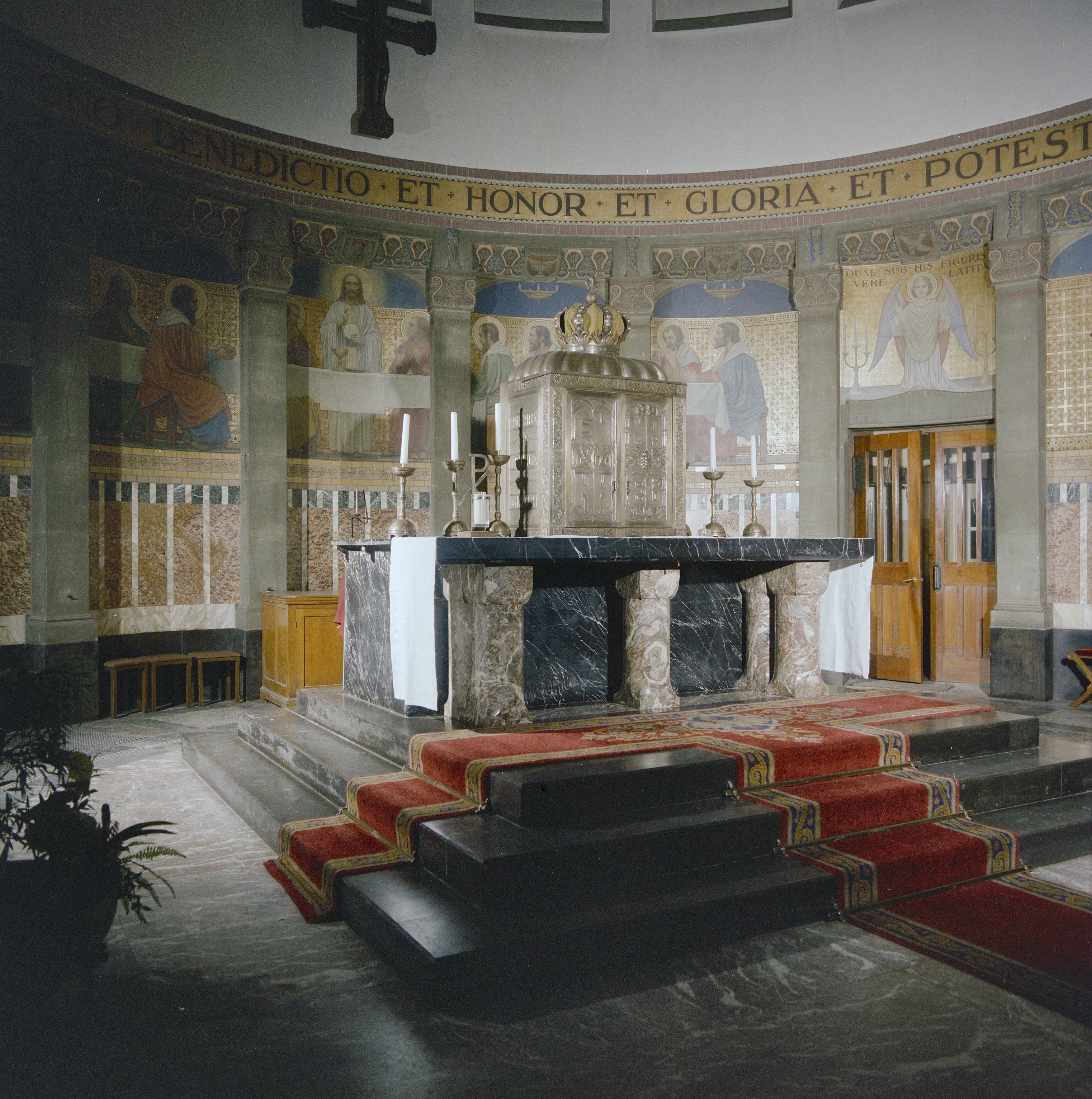 ROOMS-KATHOLIEKE KERK (HEILIGE LAURENTIUS): INTERIEUR, HOOFDALTAAR MET MUURSCHILDERING